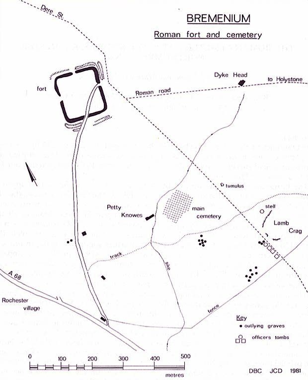 High-Rochester-Arch. Aeliana